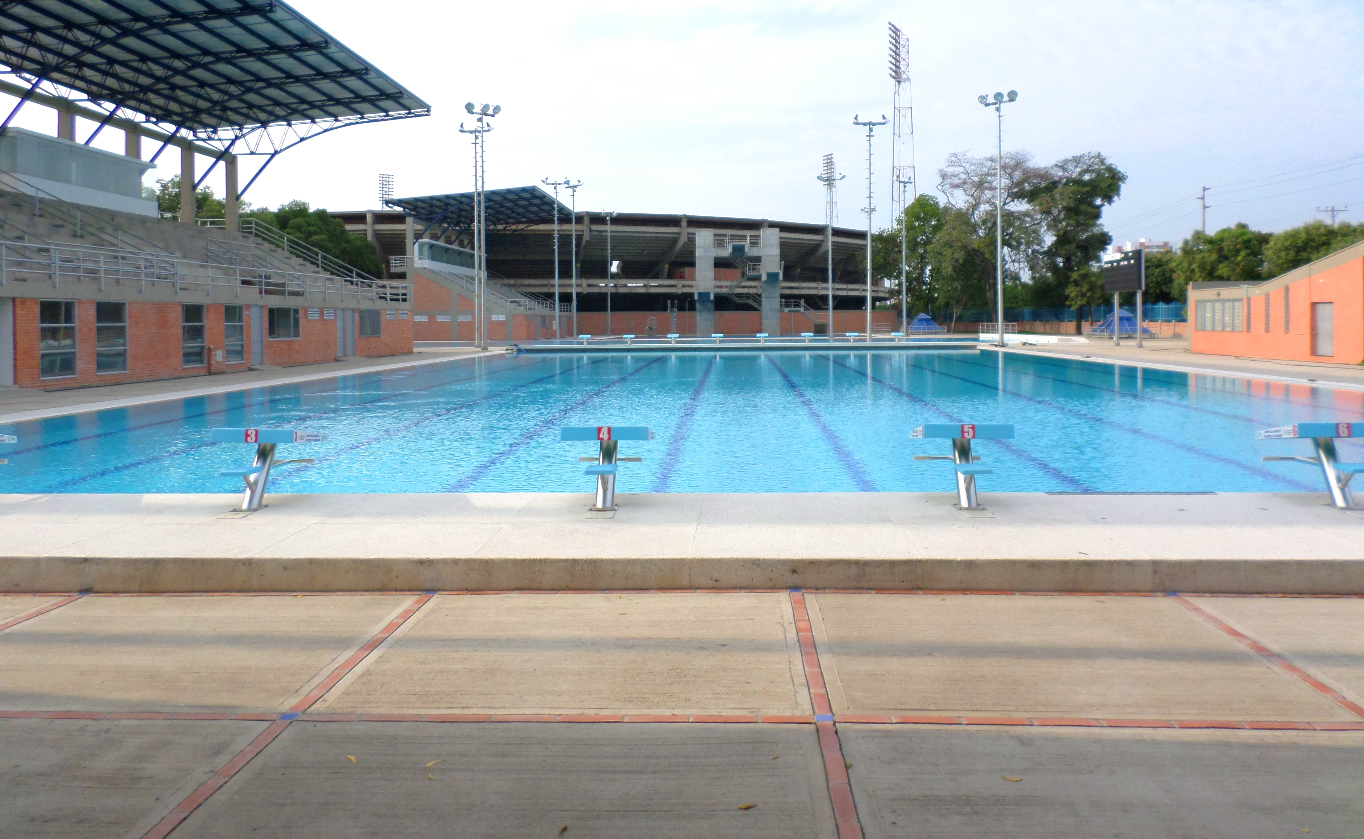 Complejo acuático Carlos Ramírez París Cúcuta, Colombia